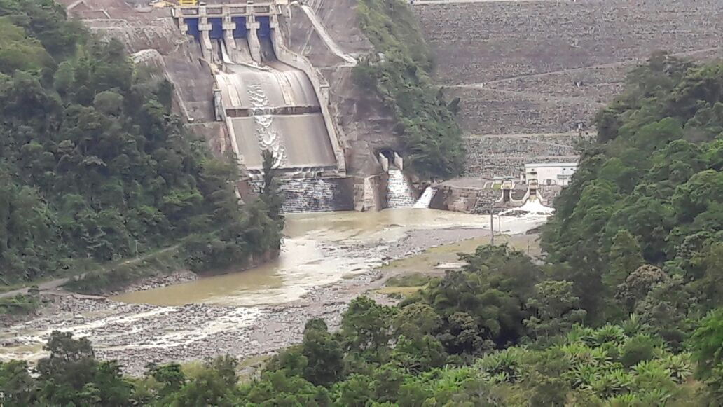 La represa hidroeléctrica Reventazón, construida por el Instituto Costarricense de Electricidad, es la más grande de Centroamérica y la segunda obra de infraestructura más grande del istmo luego del Canal de Panamá.